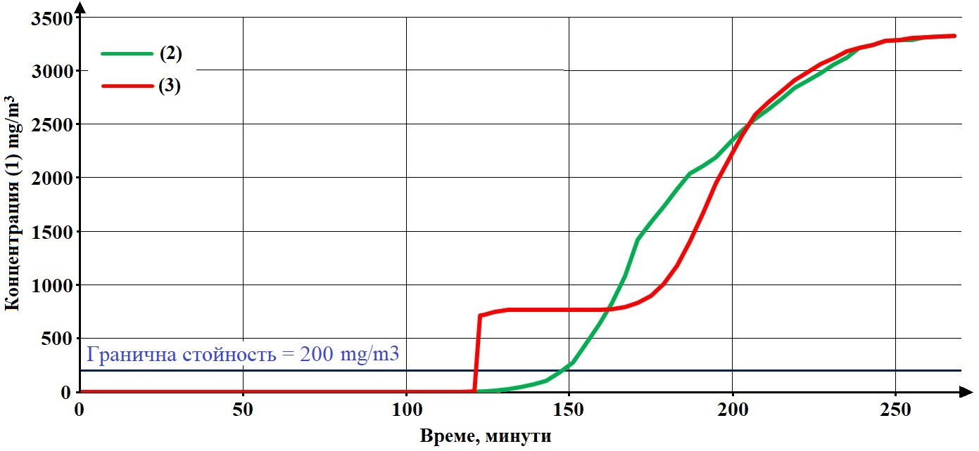 повторное использование фильтра респиратора